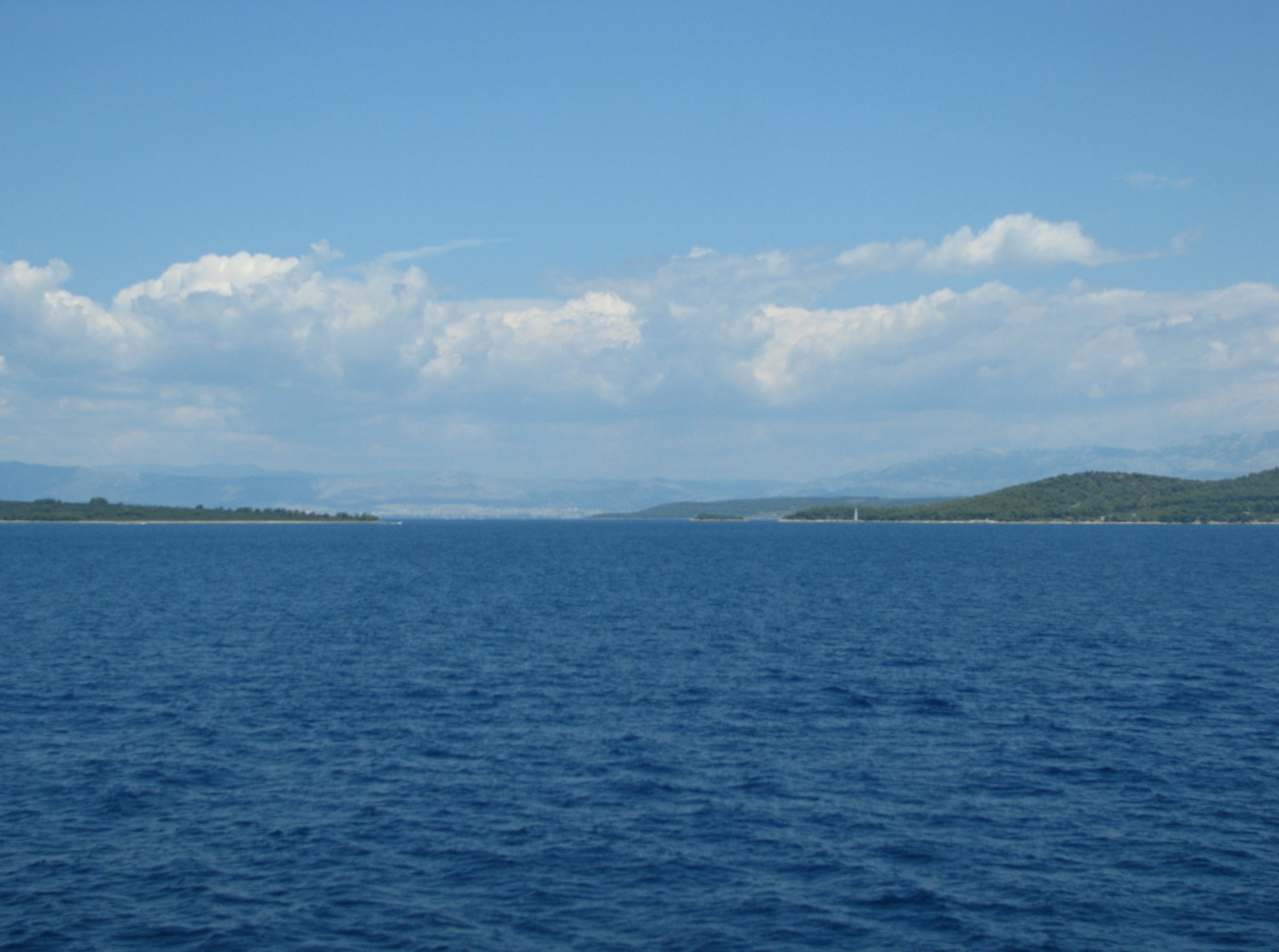 Splitska vrata (pogled s mora prema kopnu). Lijevo je otok Šolta, desno Brač. U pozadini se vidi Split.